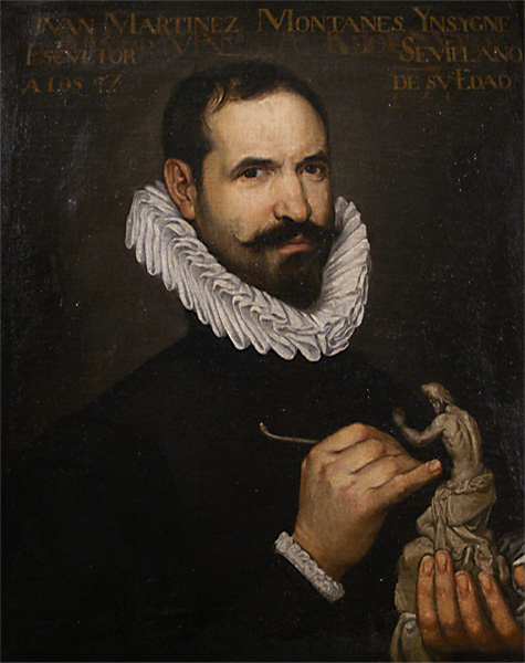 Retrato del insigne escultor español Juan Martínez Montañés (1568-1649).